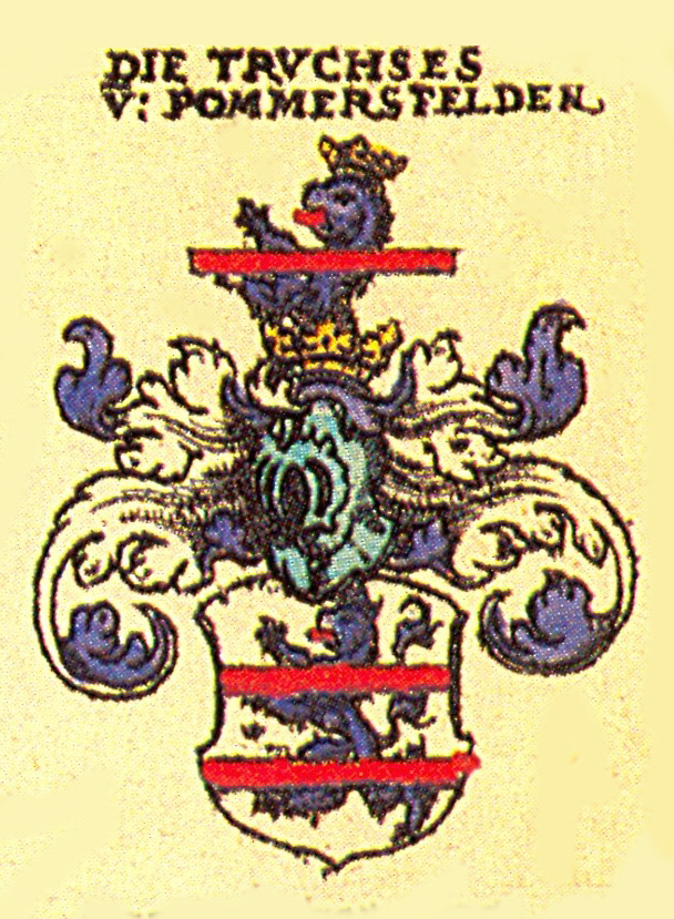 Wappen der Fränkischen Adelsfamilie Truchsess von Pommersfelden